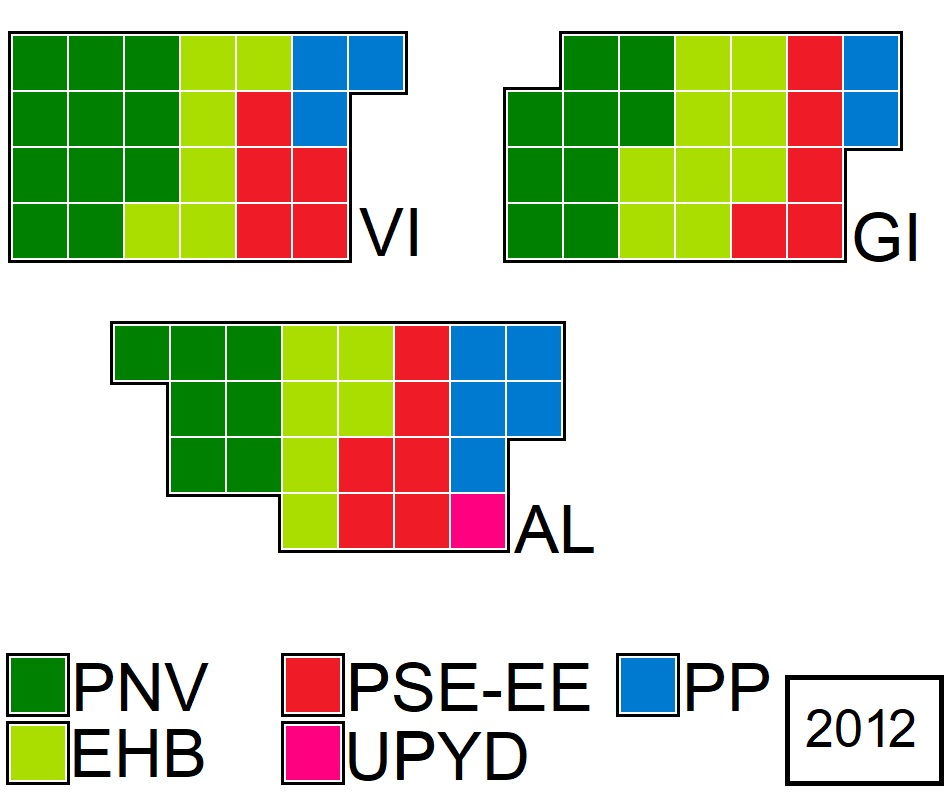 PAÍS VASCO 2012 JPEG